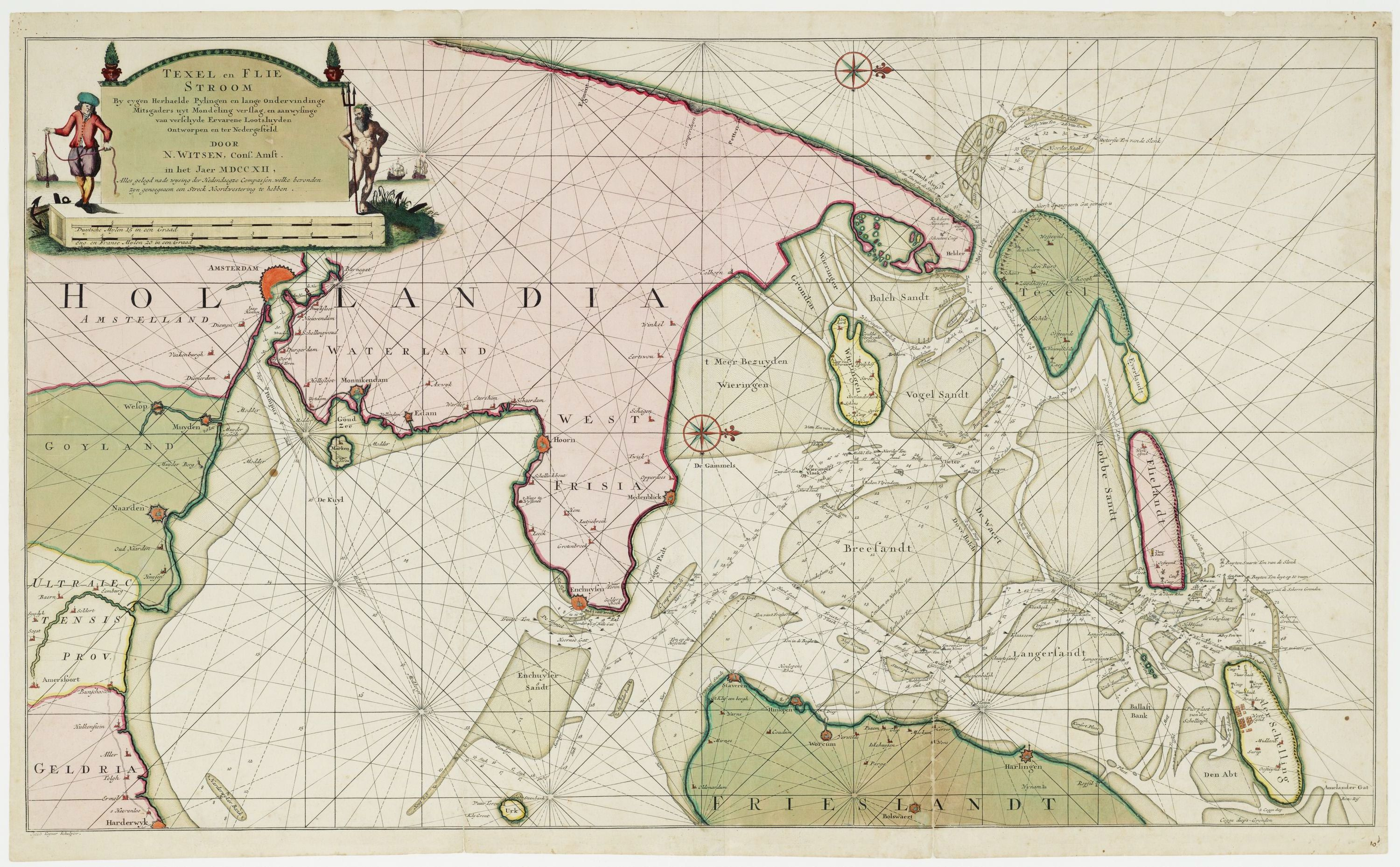 Met dank aan het Zuiderzeemuseum (voor het beschikbaarstellen van deze kaarten voor de website Historische Cartografie.